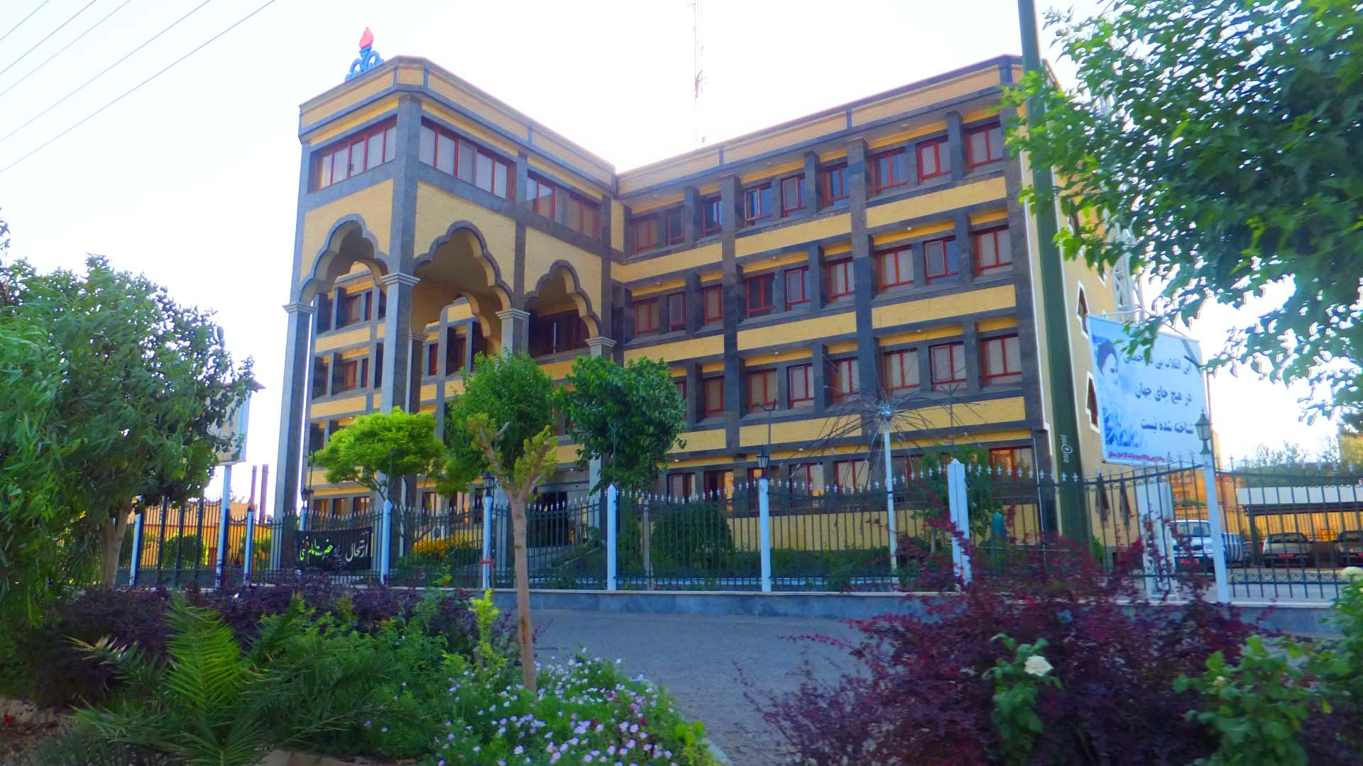 اداره گاز استان سمنان در حوالی پل امیرکبیر